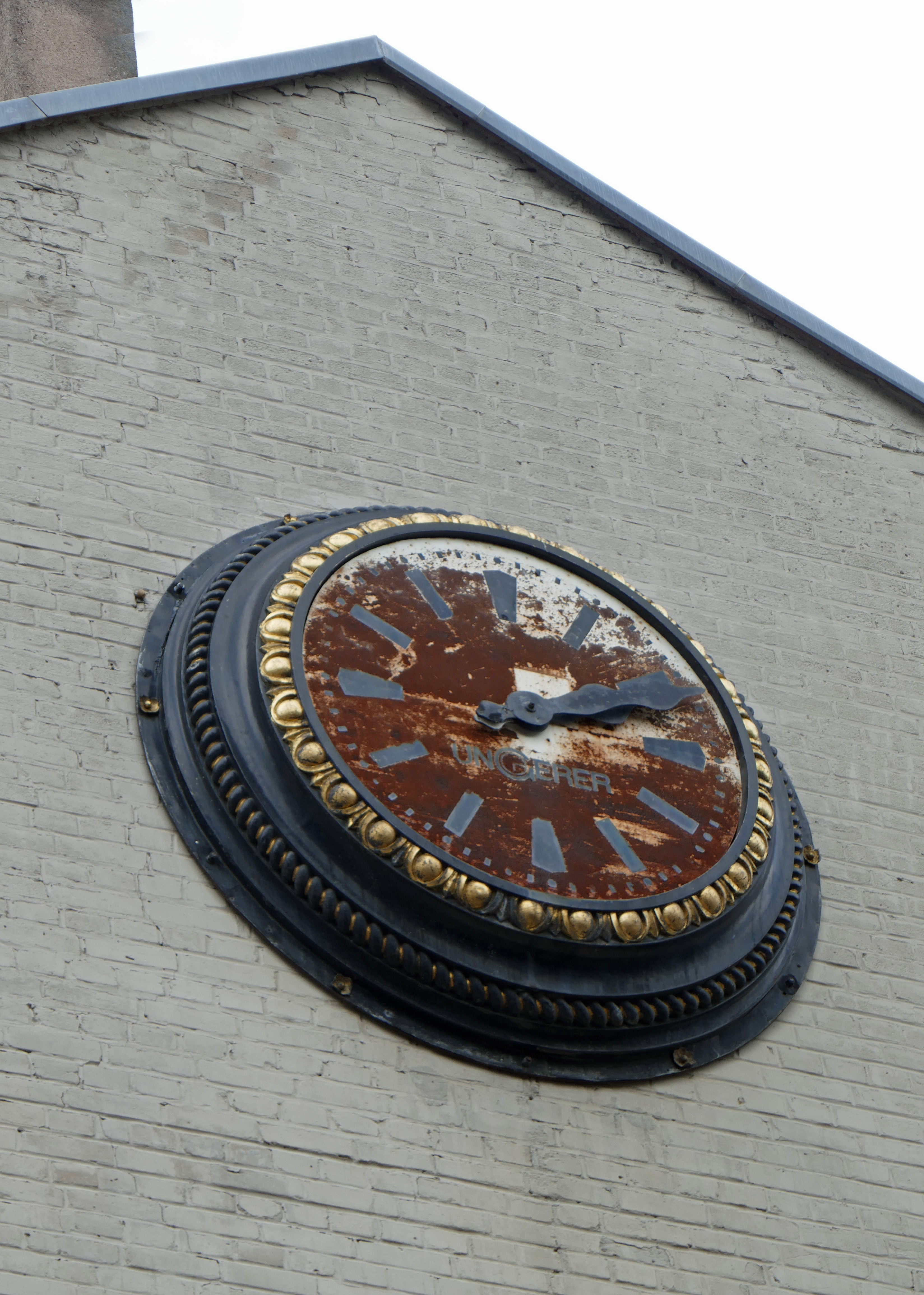 Ancienne usine d'horlogerie Ungerer. 16-18, rue La Broque à Strasbourg.